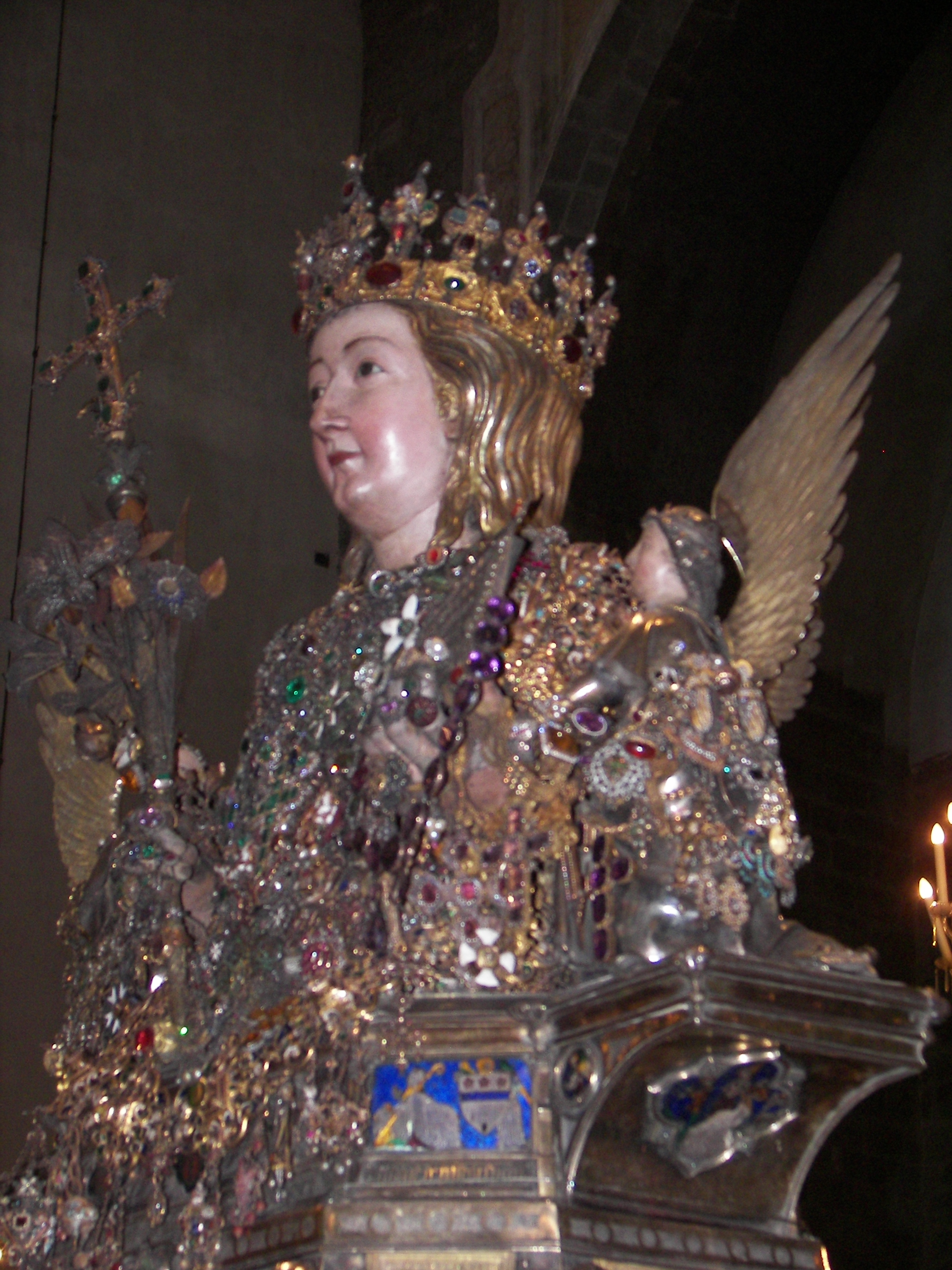 Giovanni di Bartolo (secolo XIV), Il busto-reliquiario argenteo di Sant'Agata conservato nel Duomo di Catania. Foto di Riccardo Spoto.